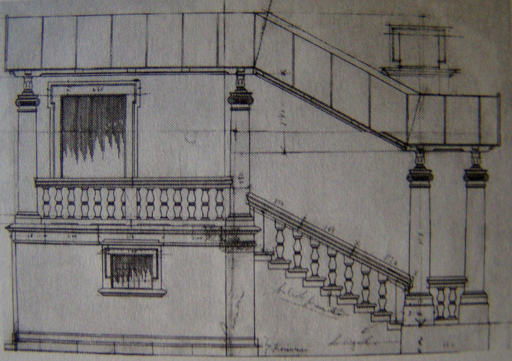 Projekt loggi przy zachodniej elewacji Starej Synagogi w Krakowie (1904)